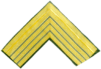 Grado di Colonnello degli alpini